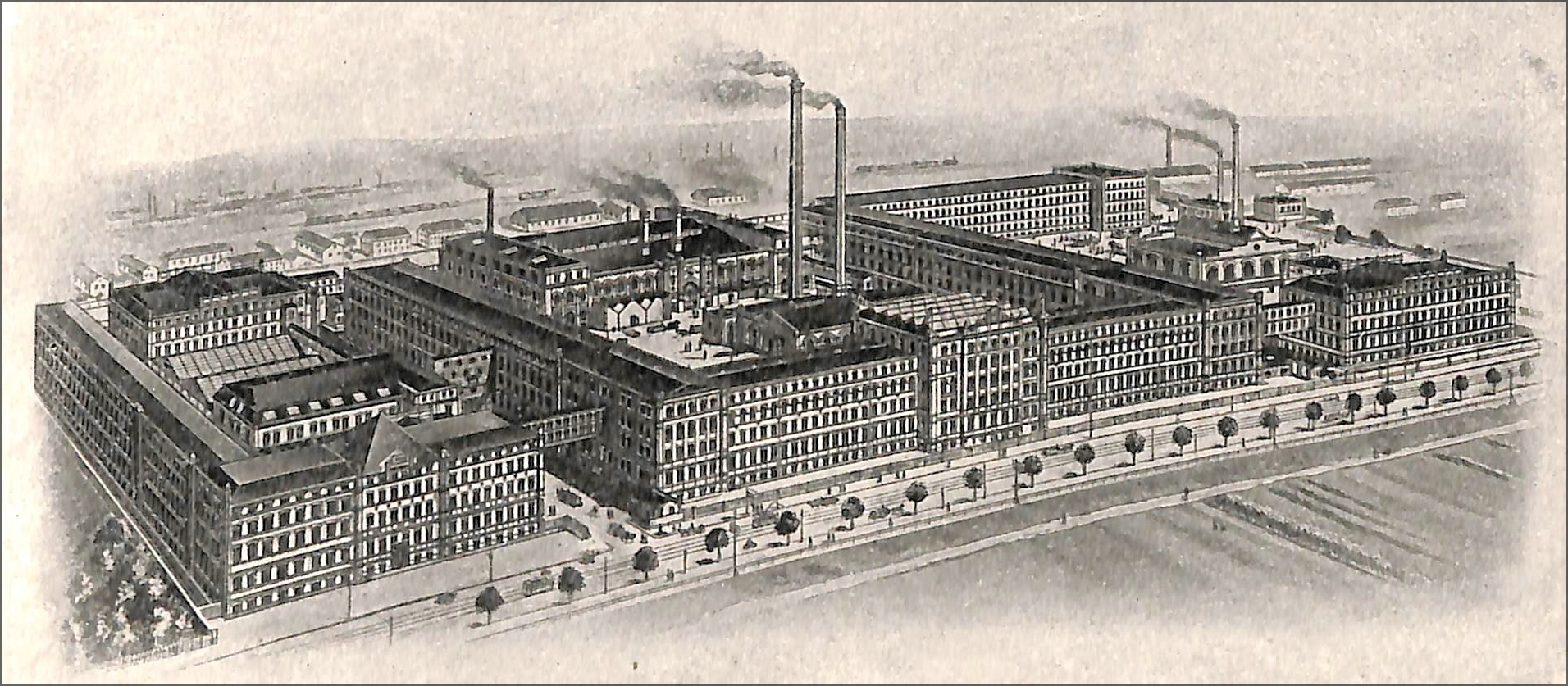 Dresden - fiktive Ansicht der Firma Seidel und Naumann.